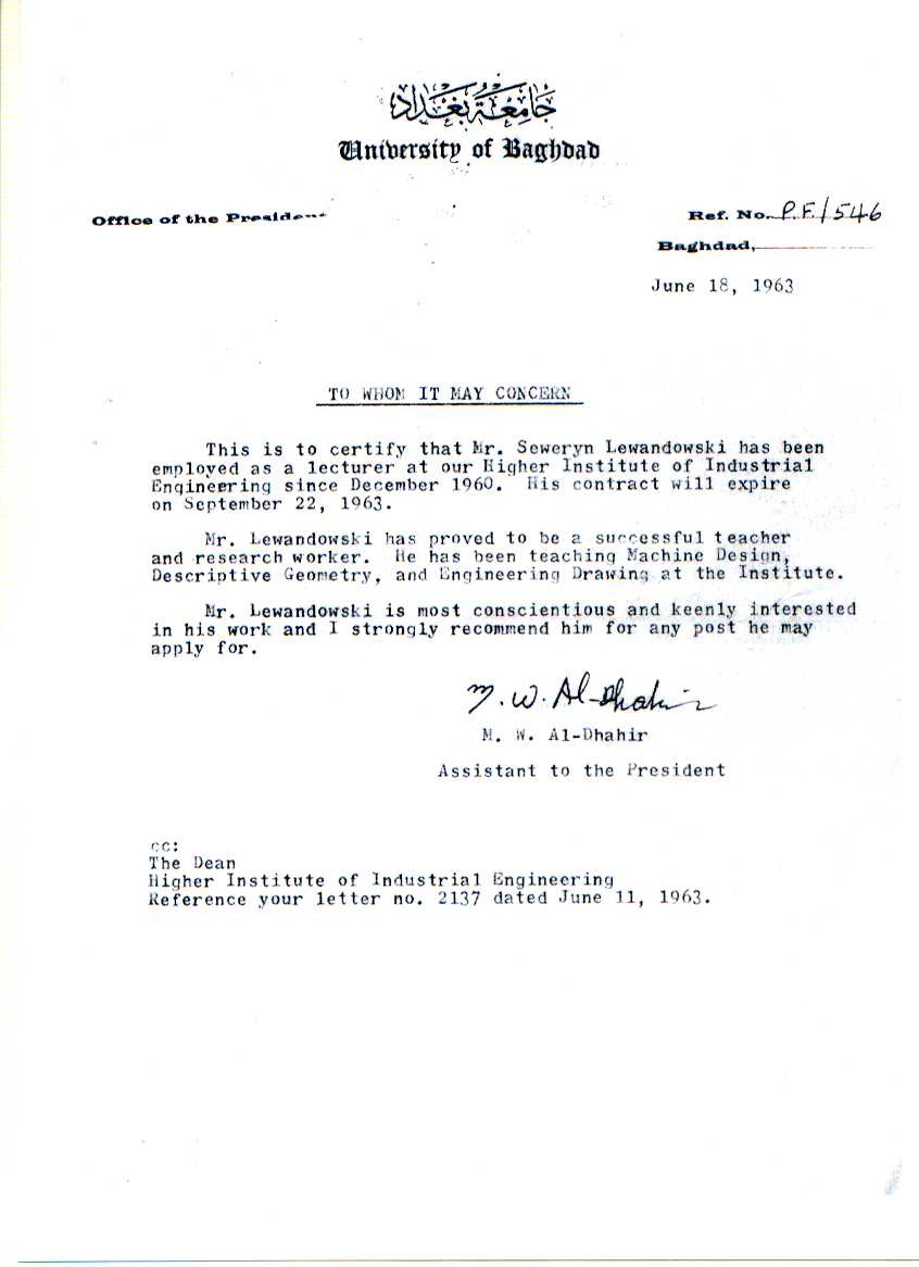 Poświadczenie pracy na Uniwesytecie Bagdadzkim